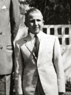 Título original: Juan Carlos de Borbón junto a su padre y su hermano Alfonso (1/1) Localización: Guipúzcoa